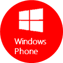 WindowsPhone Logo